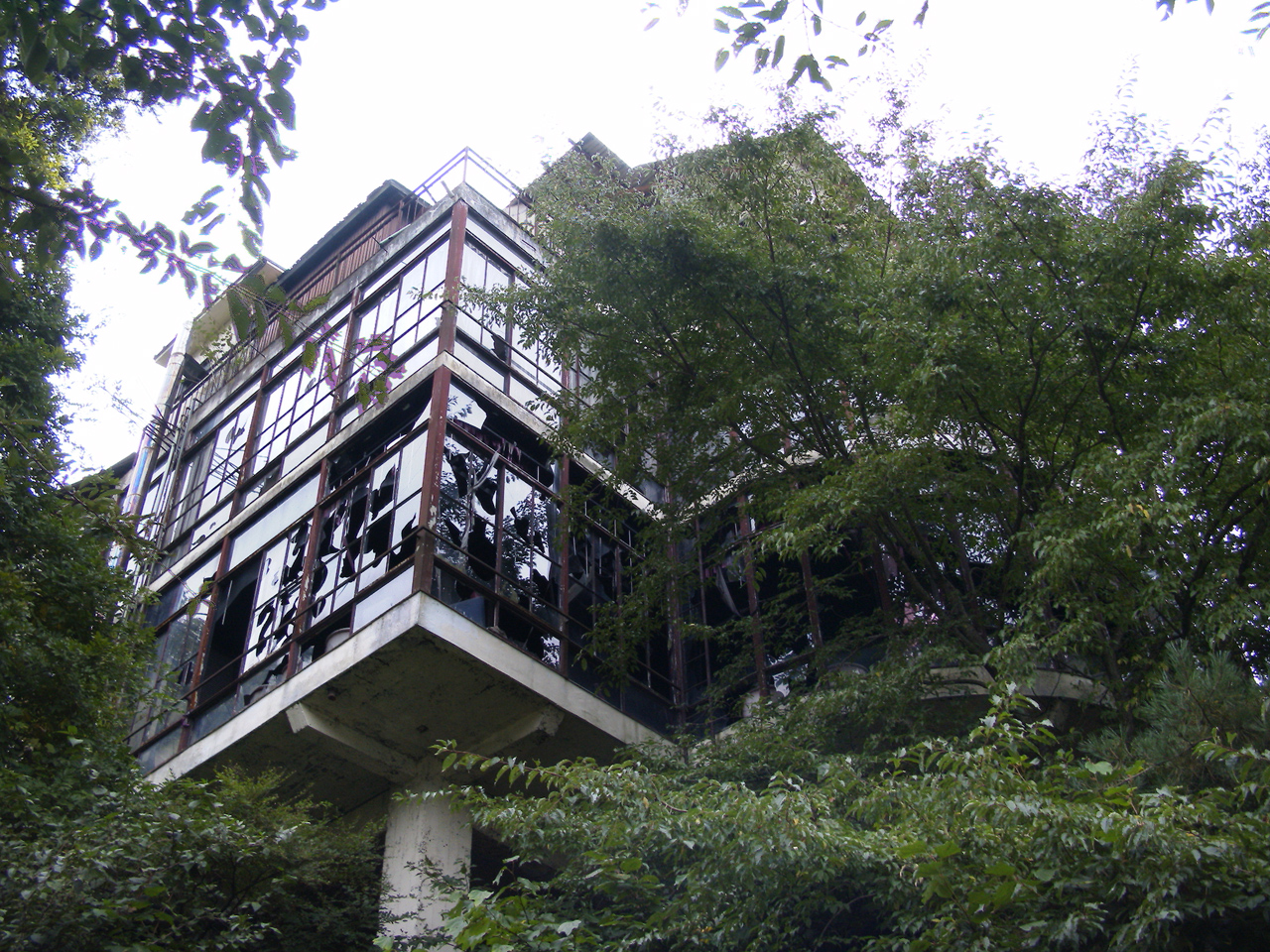 国道から見えるABBAを見上げる